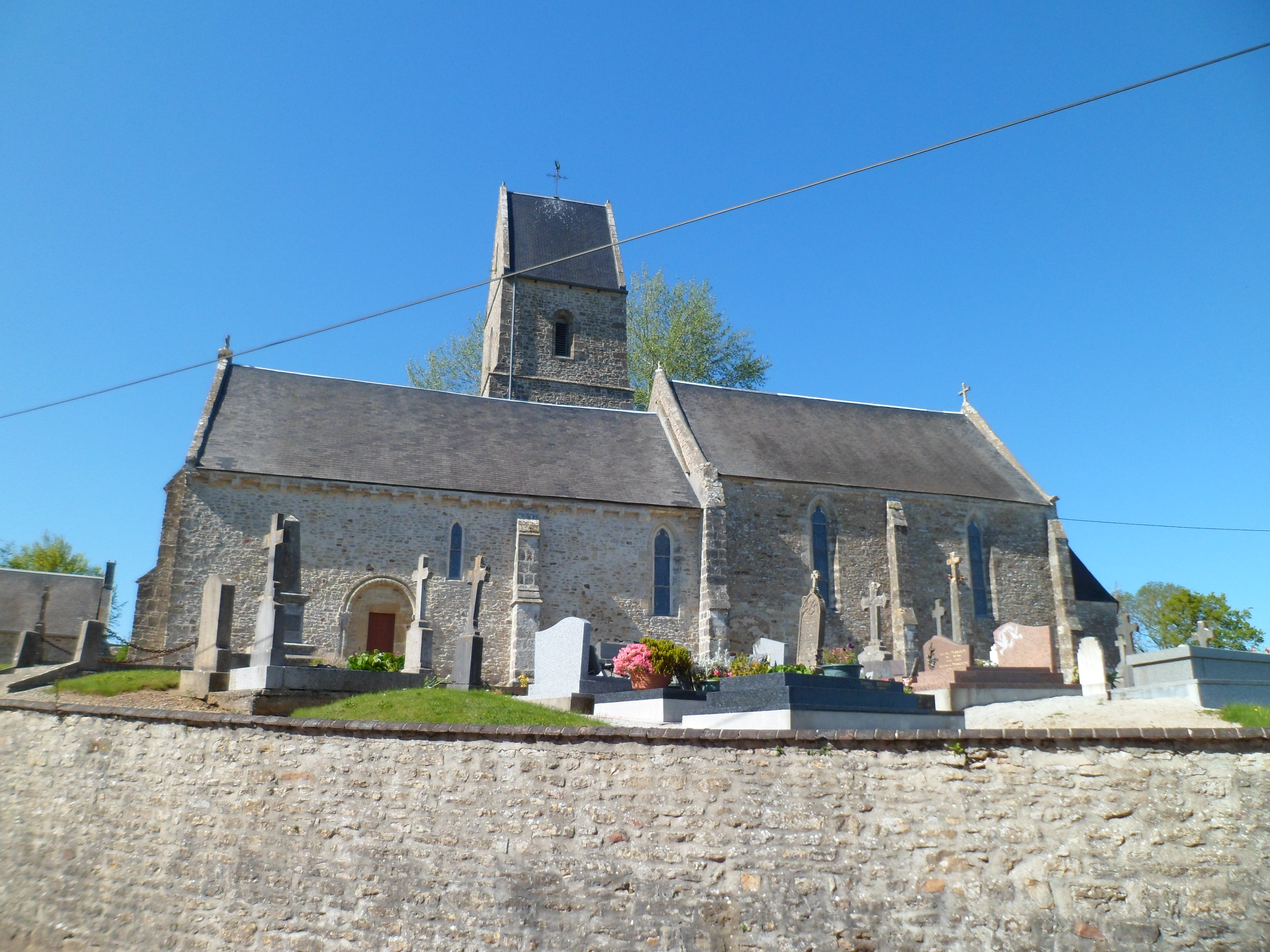 Église Saint-Jean-Baptiste d'Houtteville